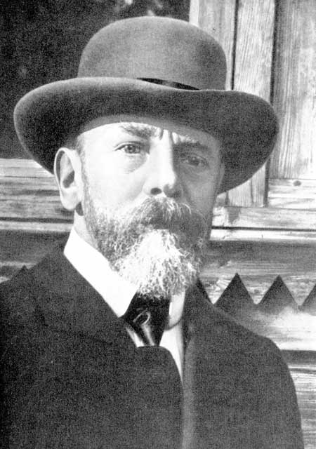 Владимир Владимирович Суслов, русский архитектор, исследователь и пропагандист древней русской архитектуры.